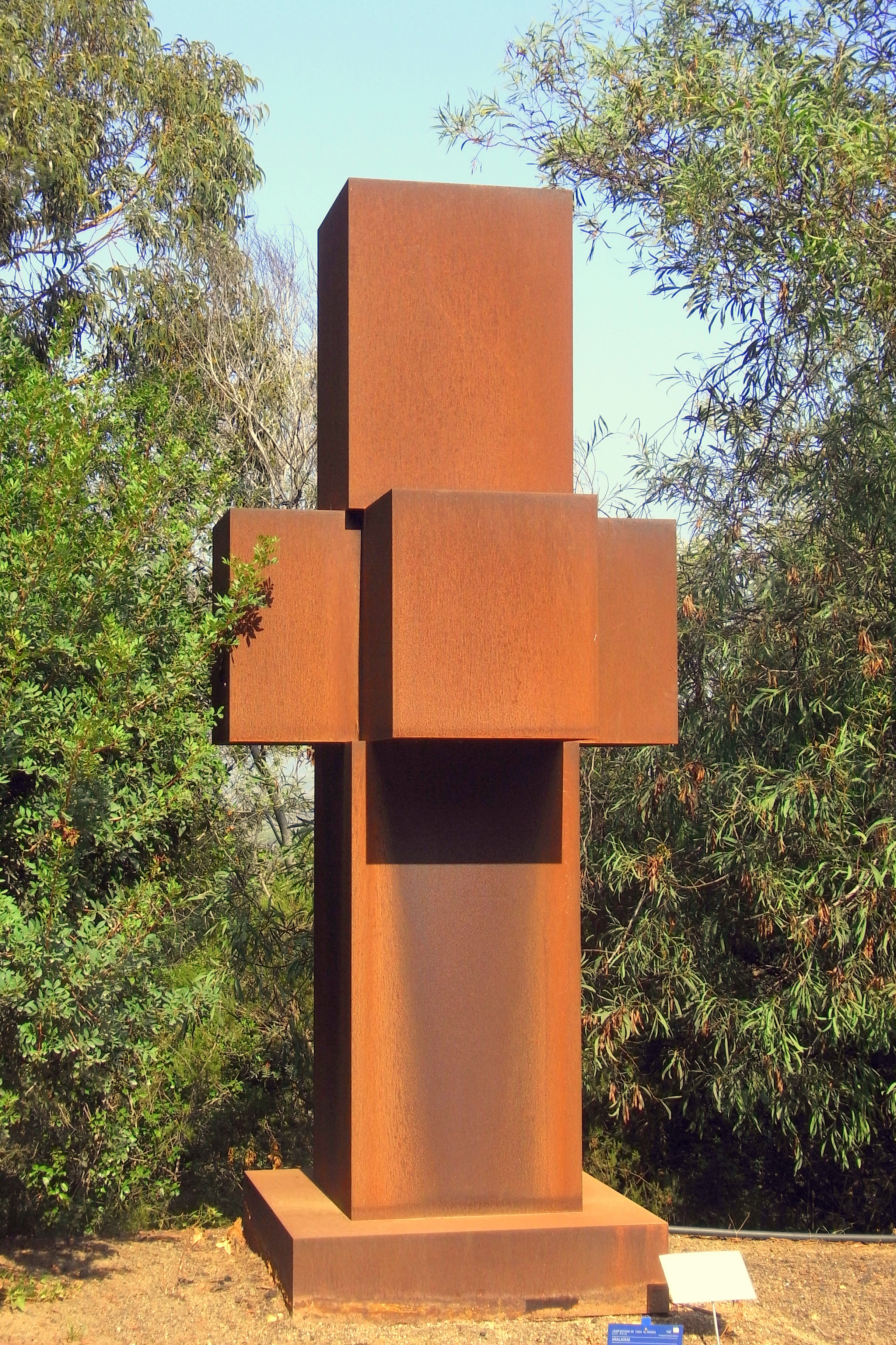 CALELLA de PALAFRUGELL . Jardí de Cap Roig "HOMENATGE al Dr. TRUETA" 2006 Torres Monsó (Girona 1922) Acer corten 300 x 126 x 130 cm